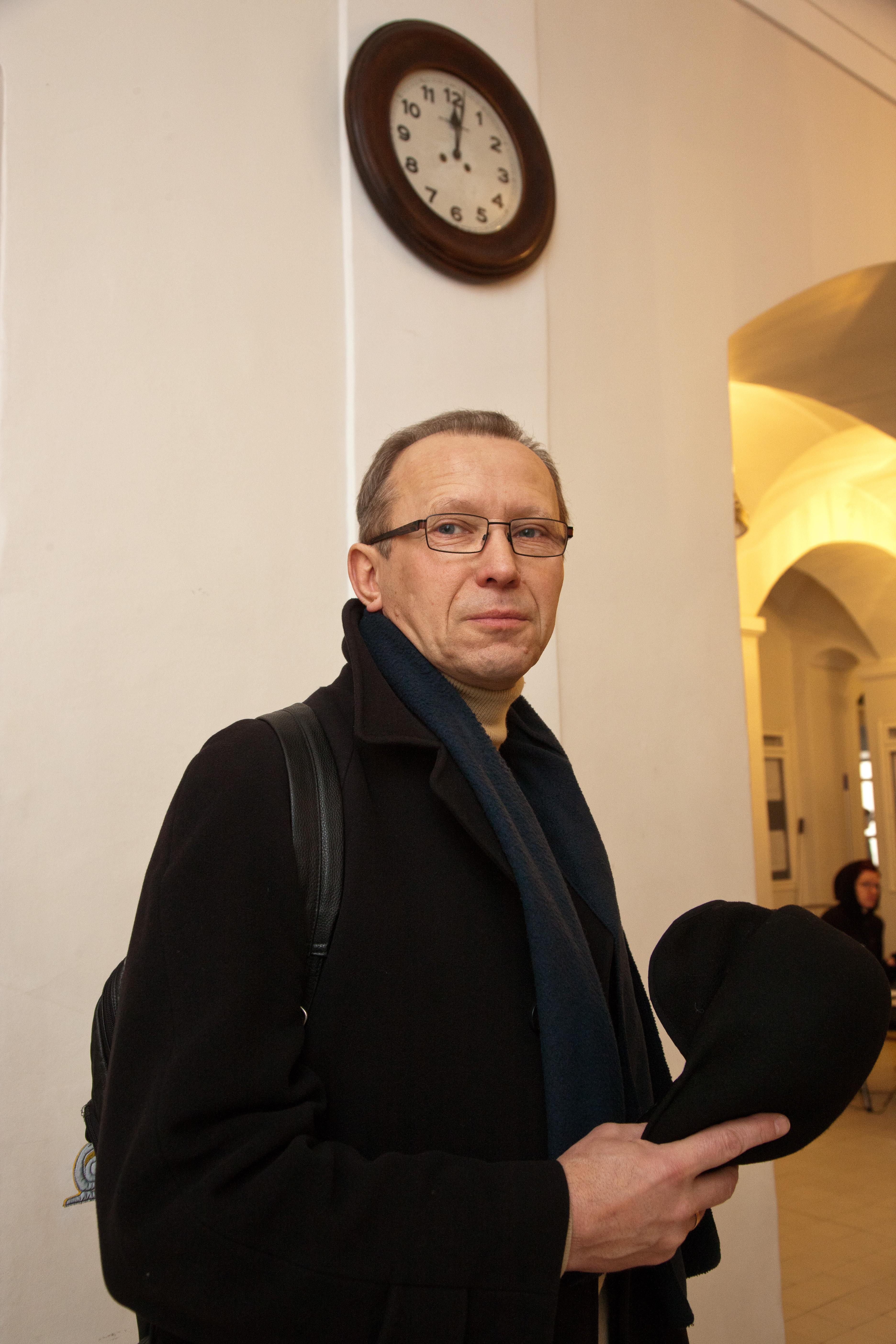 TÜ kultuurisemiootika professor Peeter Torop.